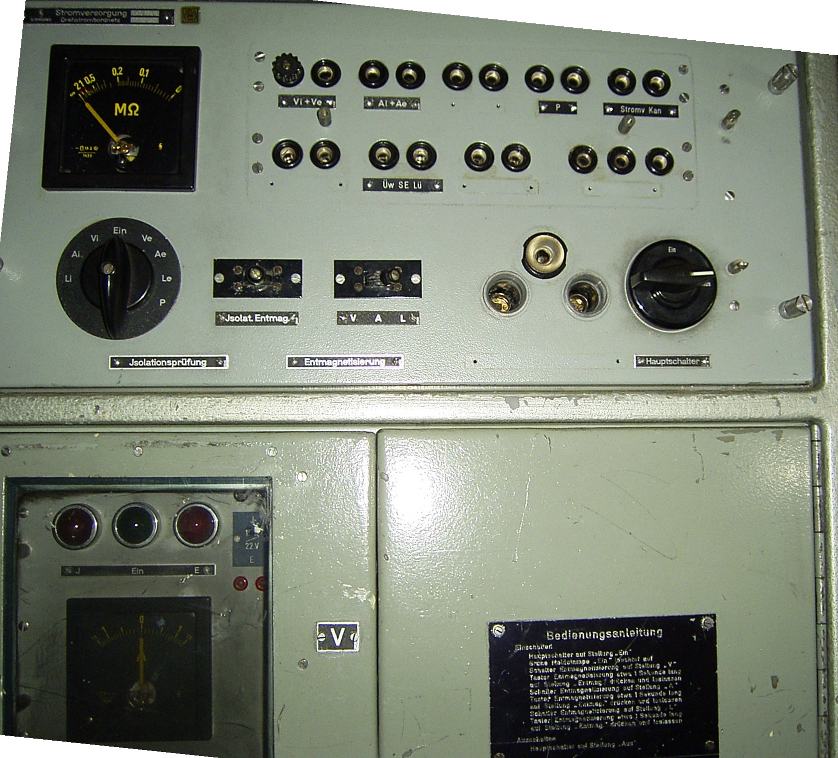 Schalttafel der magnetischen Eigenschutzanlage (MES) von U 10 (Klasse 205)